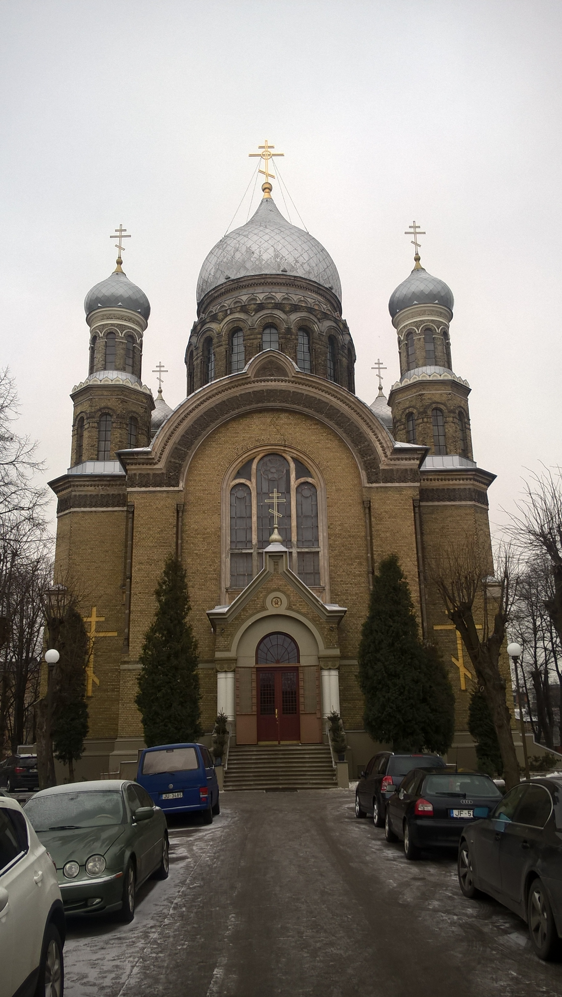 Monaster Trójcy Świętej i św. Sergiusza z Radoneża w Rydze